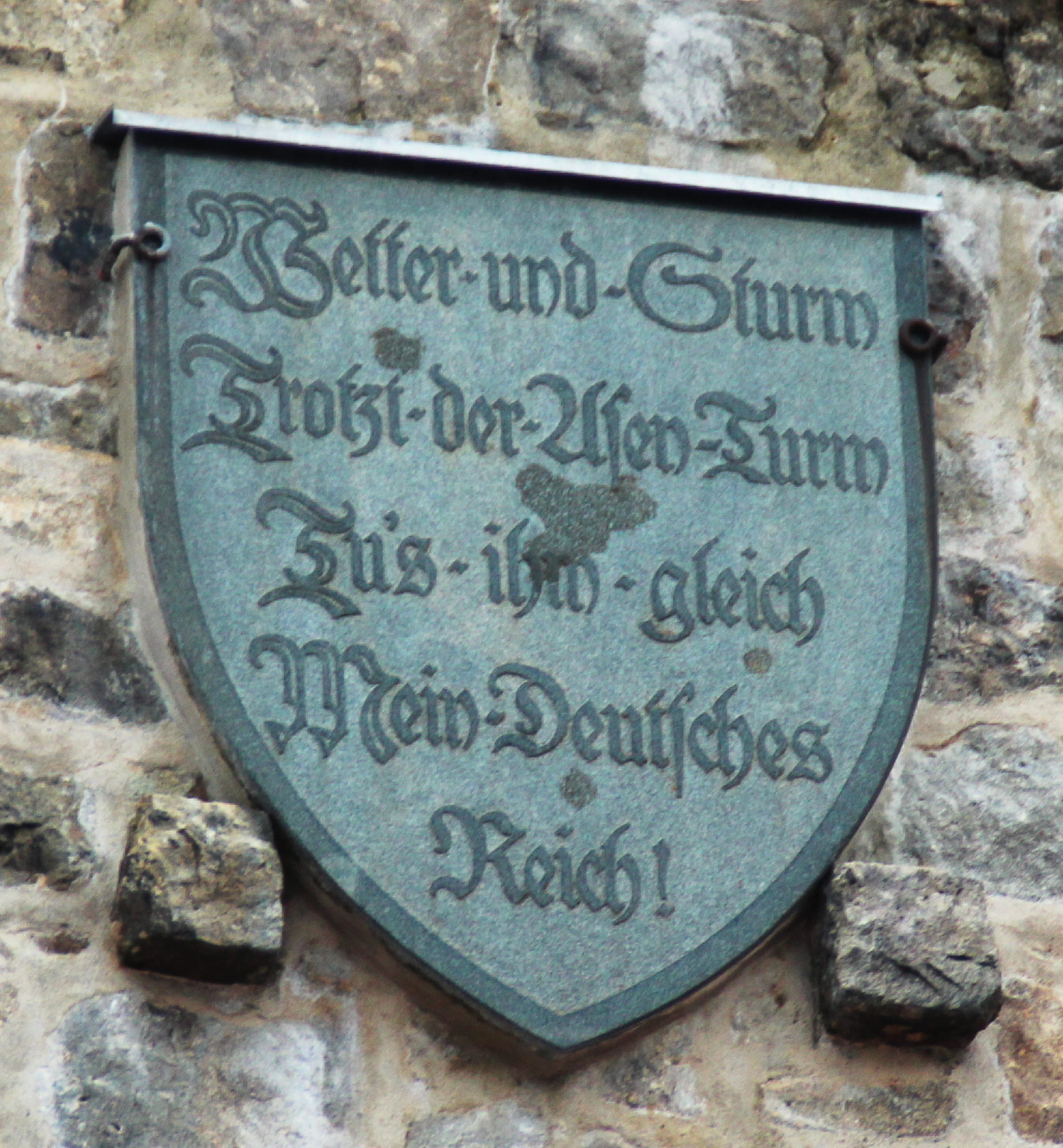 Schild am Asenturm (Ochsenkopf)